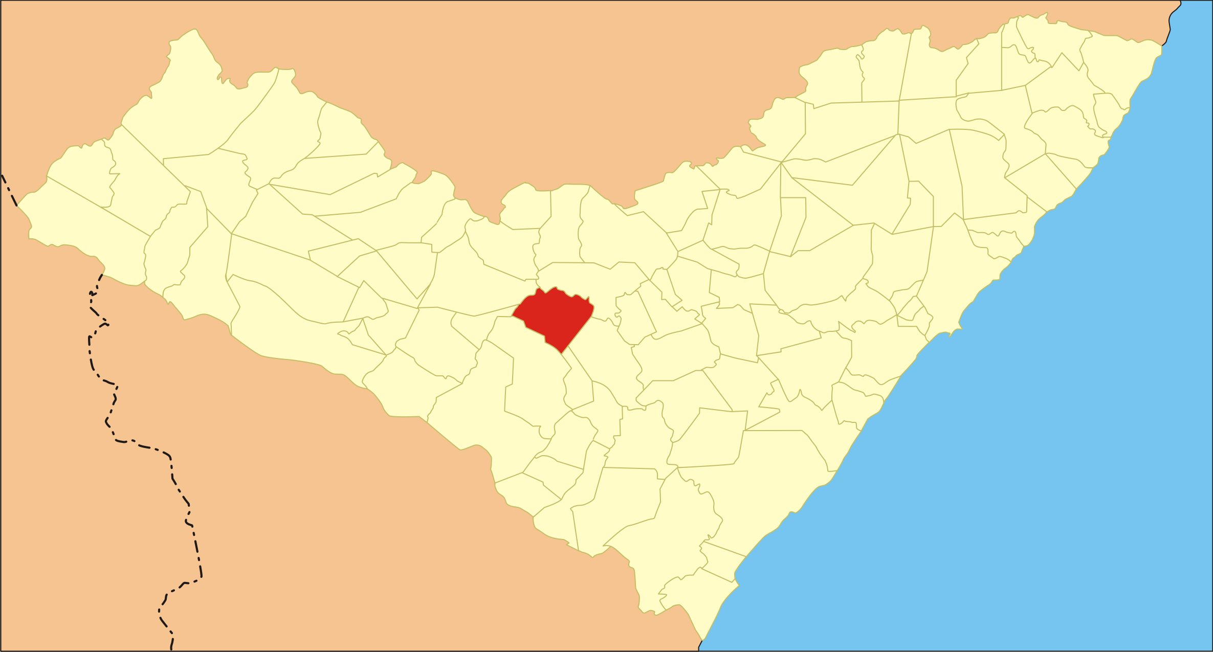 Localização da cidade em Alagoas